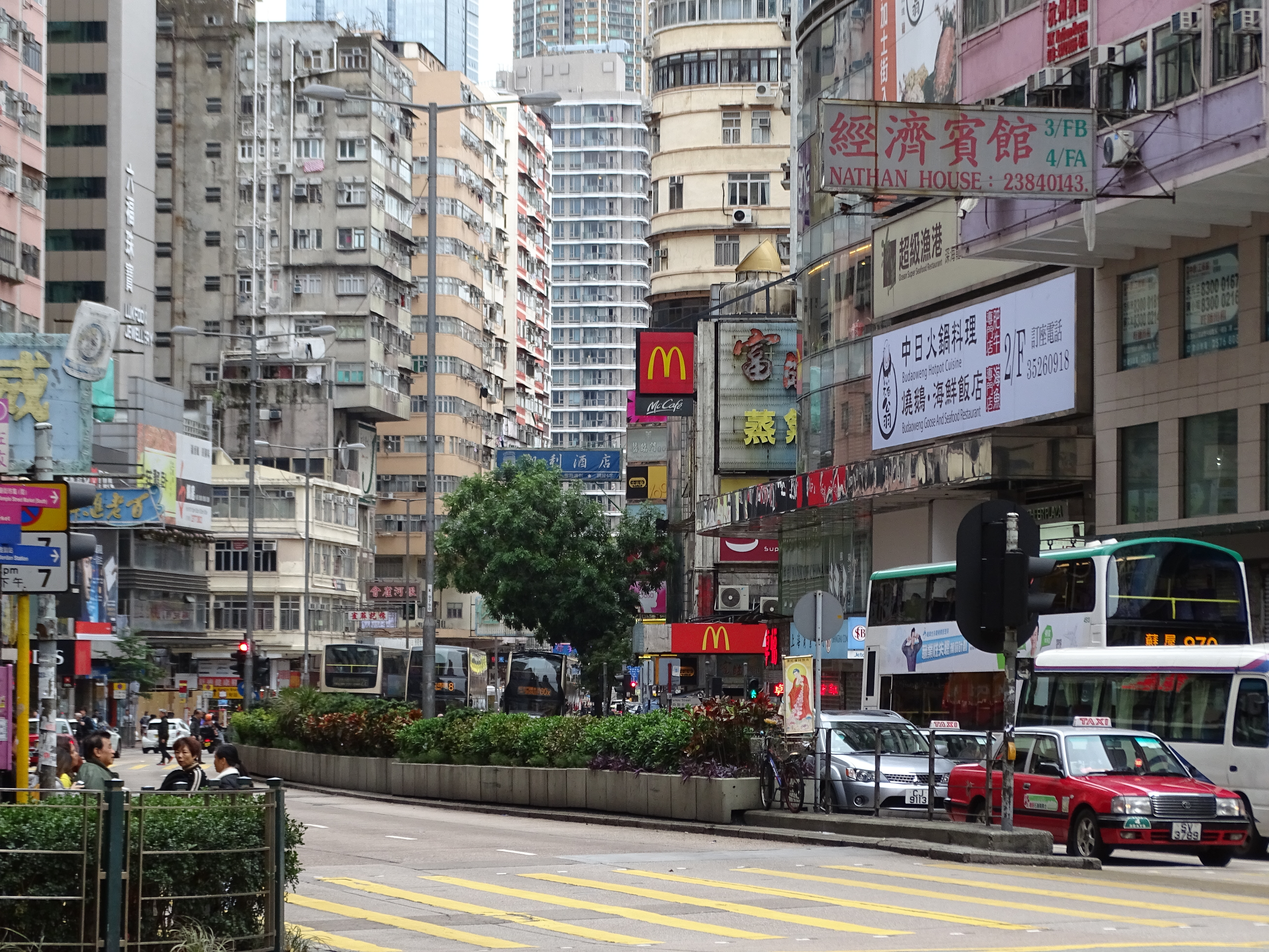 Nathan Street in Tsim Sha Tsui, Kowloon, Hong Kong